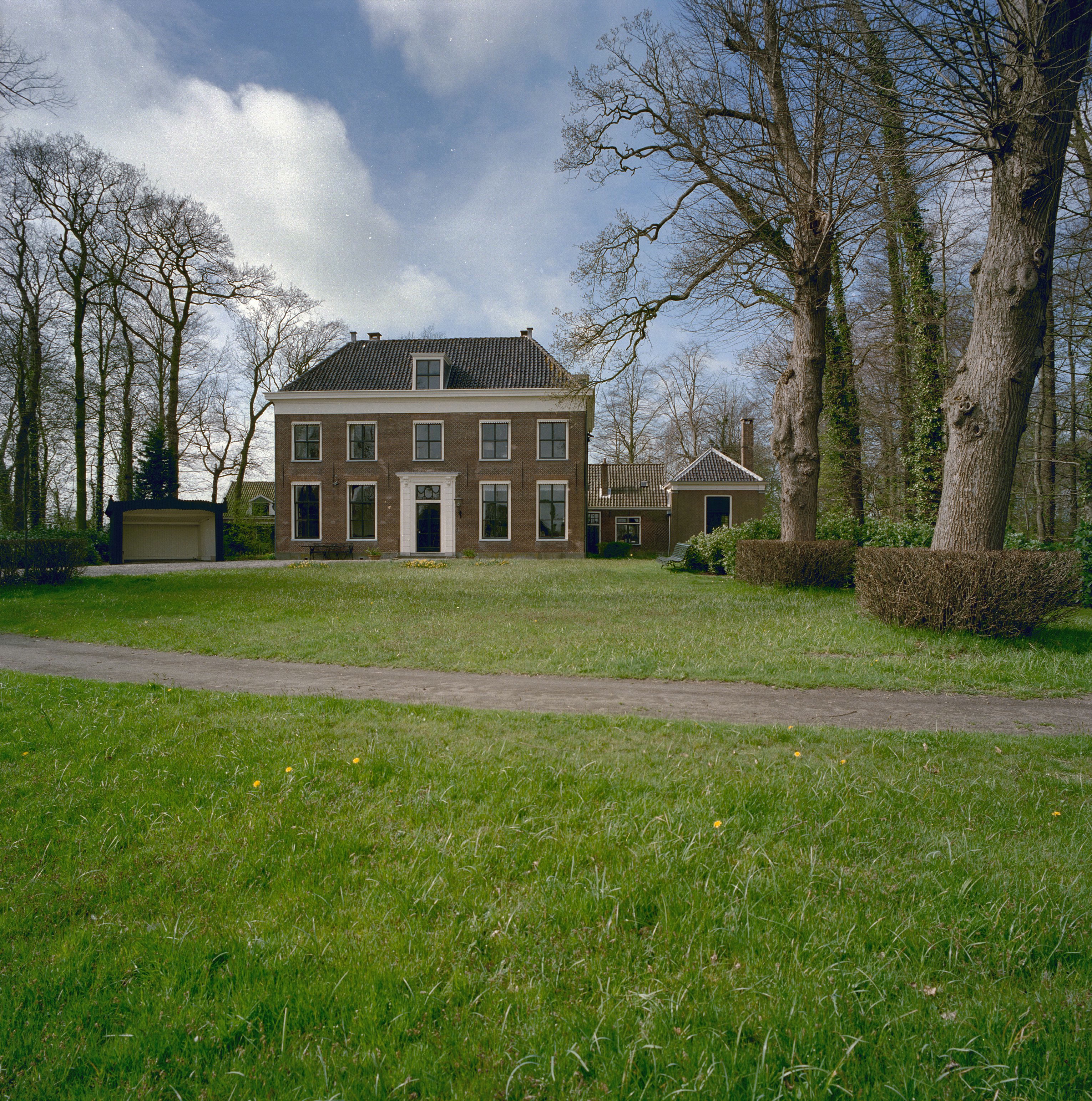 Huis Oostergeest: Overzicht voorgevel (opmerking: Gefotografeerd voor Kastelen en Buitenplaatsen in Zuid-Holland)